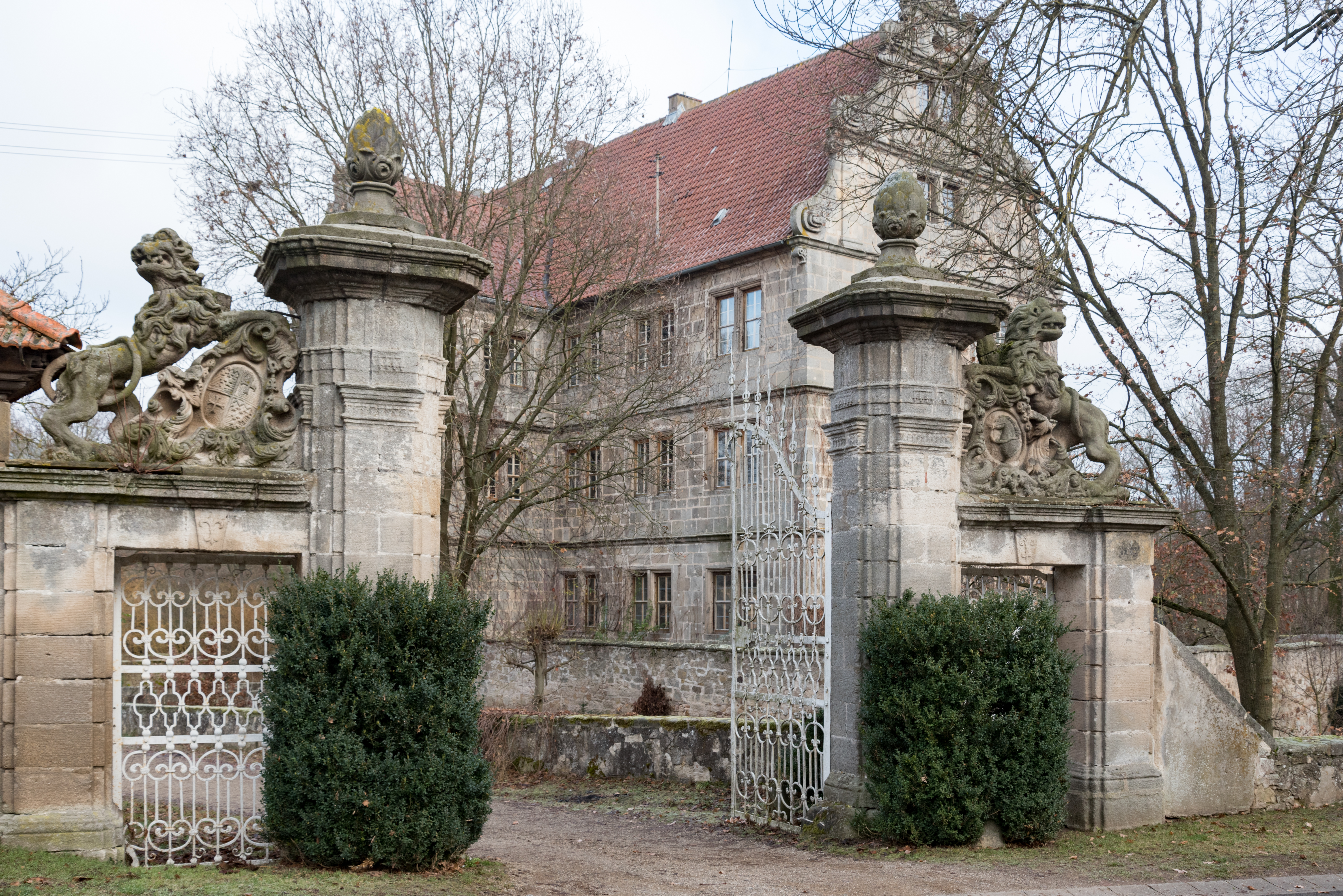 Aidhausen, Friesenhausen, Dalbergstraße 12, Schlosstor